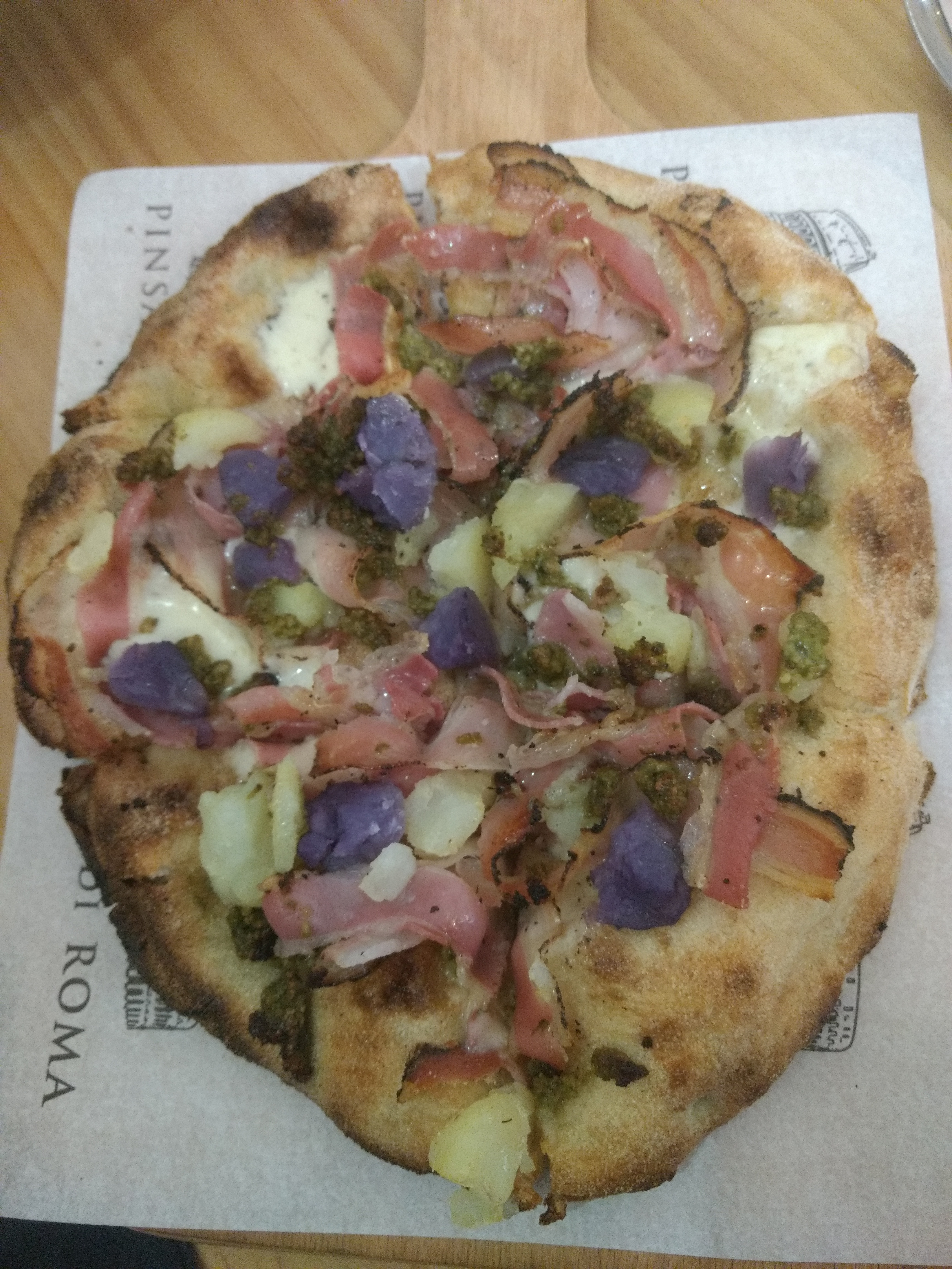 Pinsa Liguria a un restaurant italià de València. Mozzarella, pancetta, creïlla i pesto